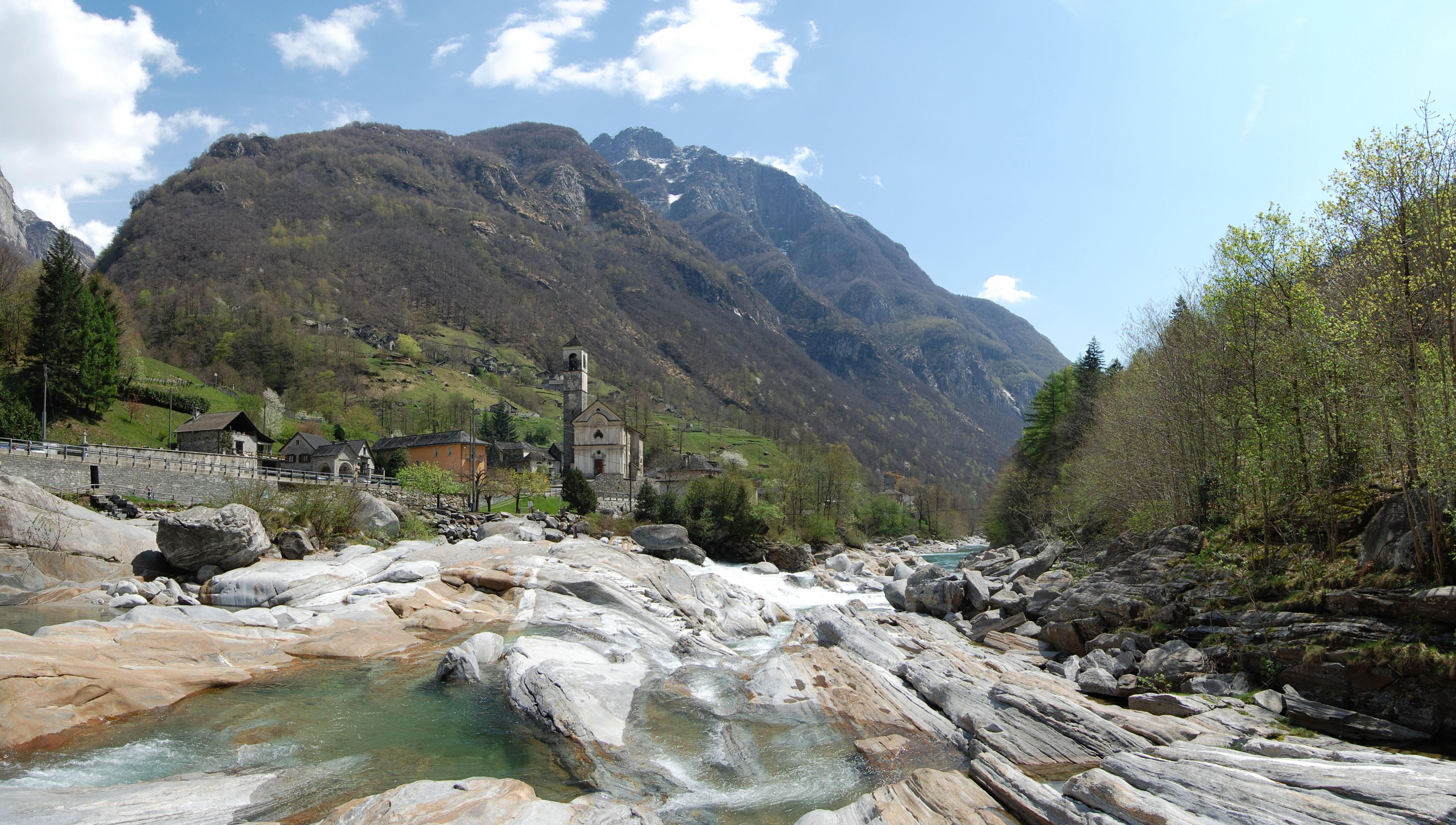 Blick auf Lavertezzo (Tessin). Im Vordergrund sind verfaltete Para- und Orthogneise zu erkennen (vor ca. 300 Mio. Jahren intrudierte granitische Magma in Sedimente, sodass die Grenze zwischen dem Para- und Orthogneis (der Paragneis ist hier eher bräunlich, Orthogenis eher grau) heute sehr scharf ist). Weiter sind auch Quarz-Gänge - etwa 20 Millionen Jahre alt - zu erkennen (u.a. Pegmatit und Aplit). Die Gesteine wurden geformt durch Flusserosion ausgehend von der Verzasca.